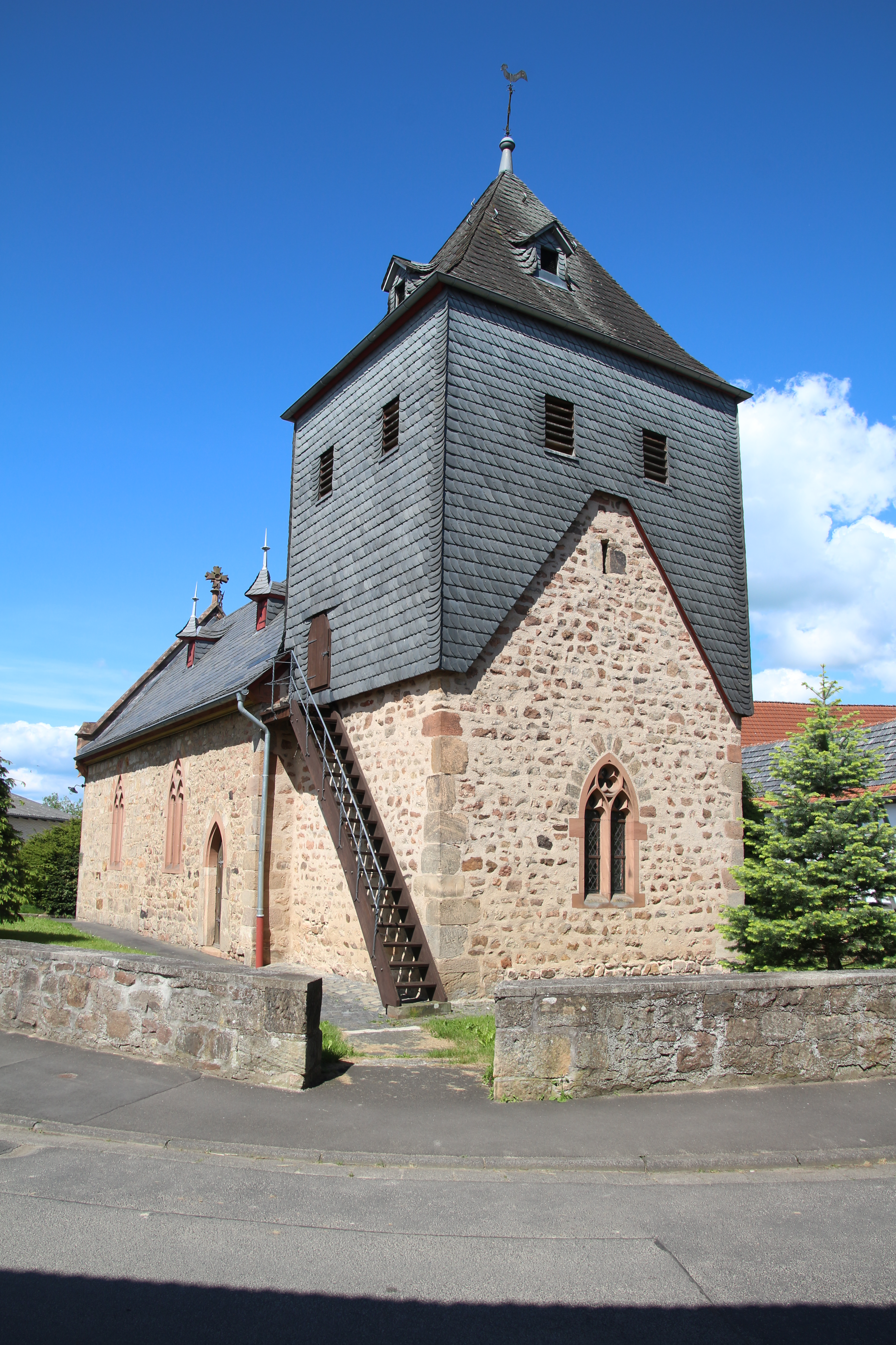 Siehe Bild und Dateiname